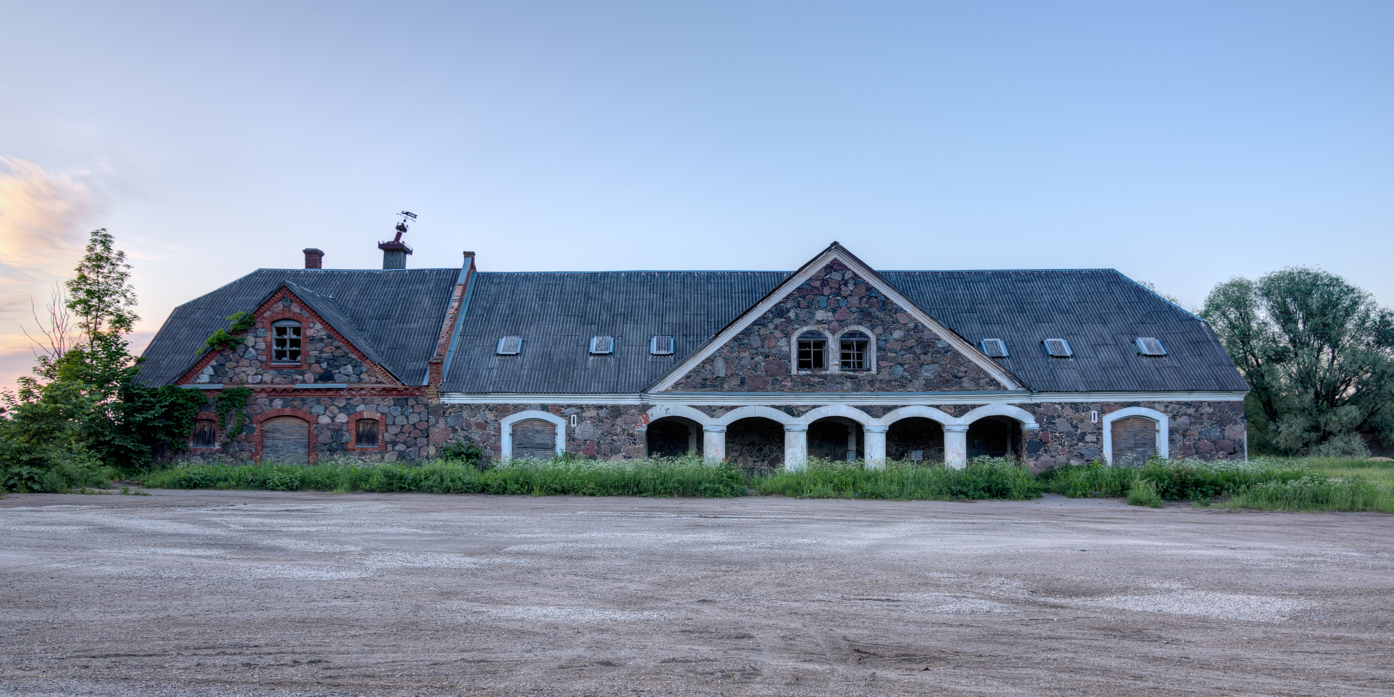 Patküla mõisa ait-kuivati. Eestvaade